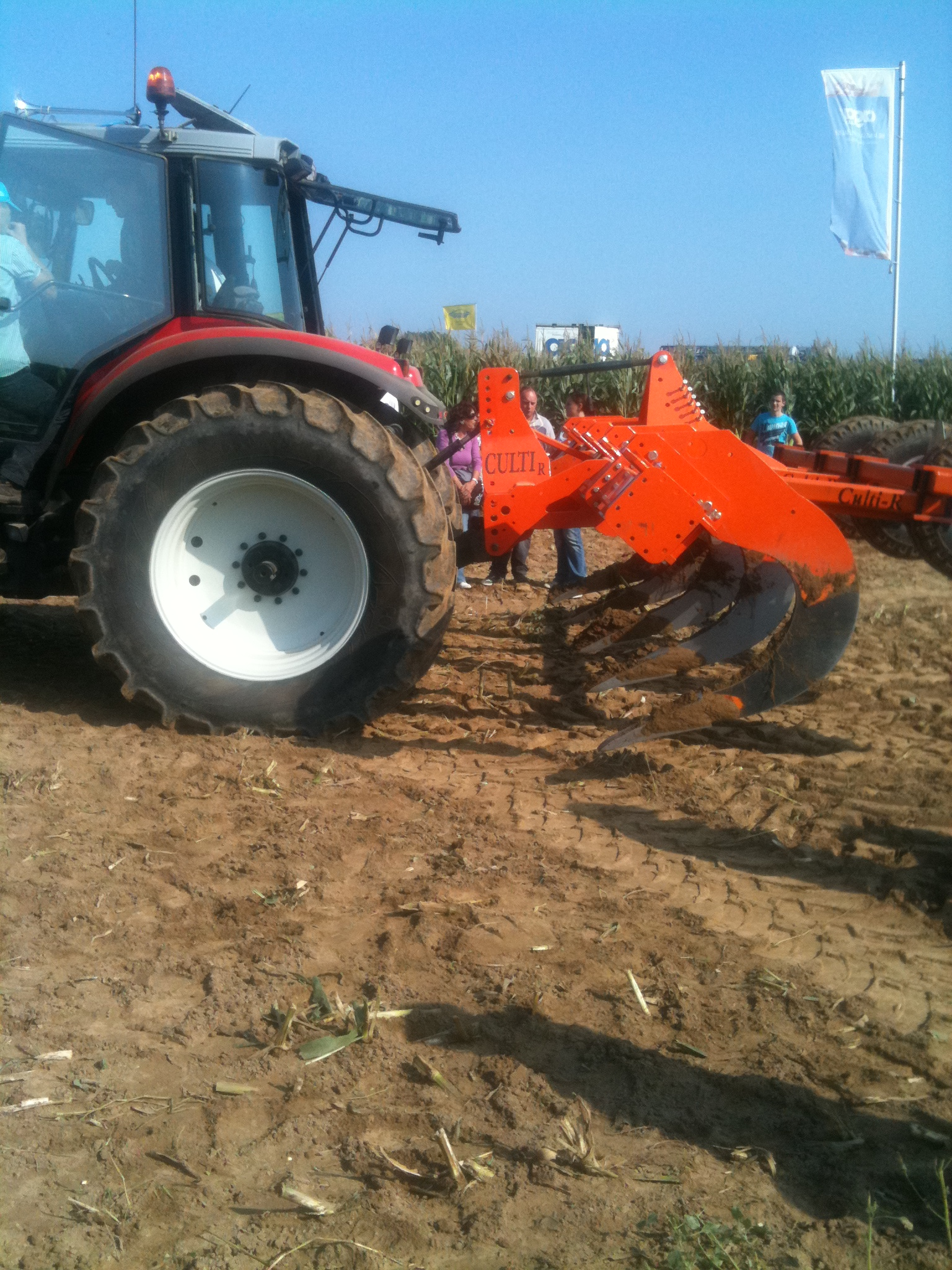 Untergrundlockerer der Marke Culti-R (SHM-Machinery, Oosterzele)